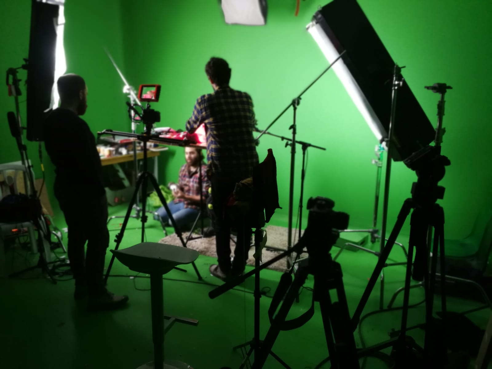 מאחוריי הקלעים גרביים